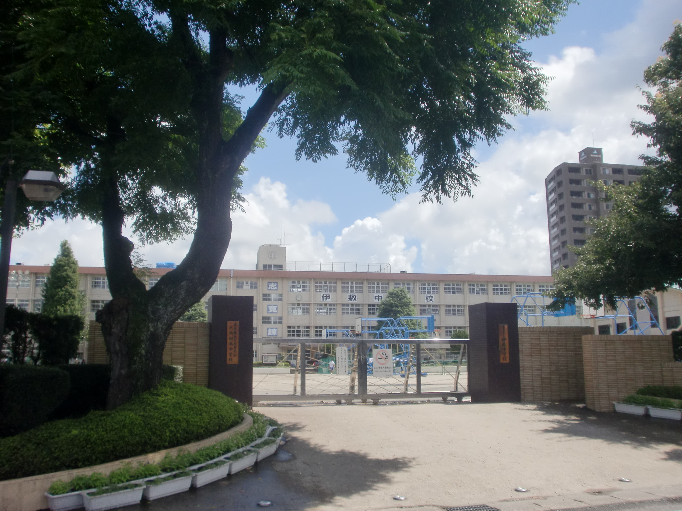 鹿児島市立伊敷中学校の外観。